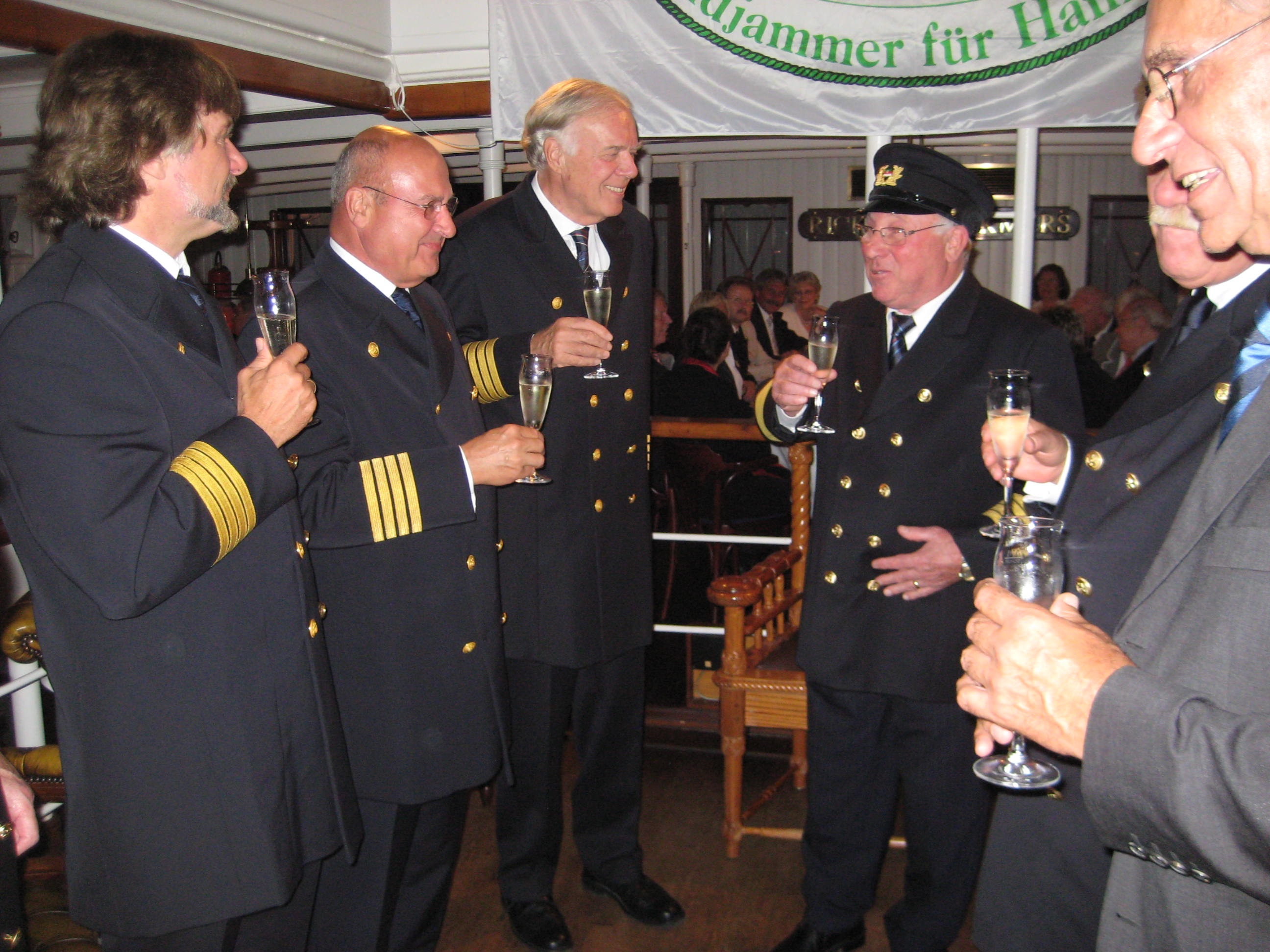 Ehrenkapitäne der Rickmer Rickmers 2008 bei der Ernennung Uwe Seelers zum 16. Ehrenkapitän. Von links Arved Fuchs, Herbert von Nitzsch (ehemals Blohm & Voss), Christel Vinnen (Reeder, DGzRS) Uwe Seeler. Ganz rechts angeschnitten Helge Adolphsen